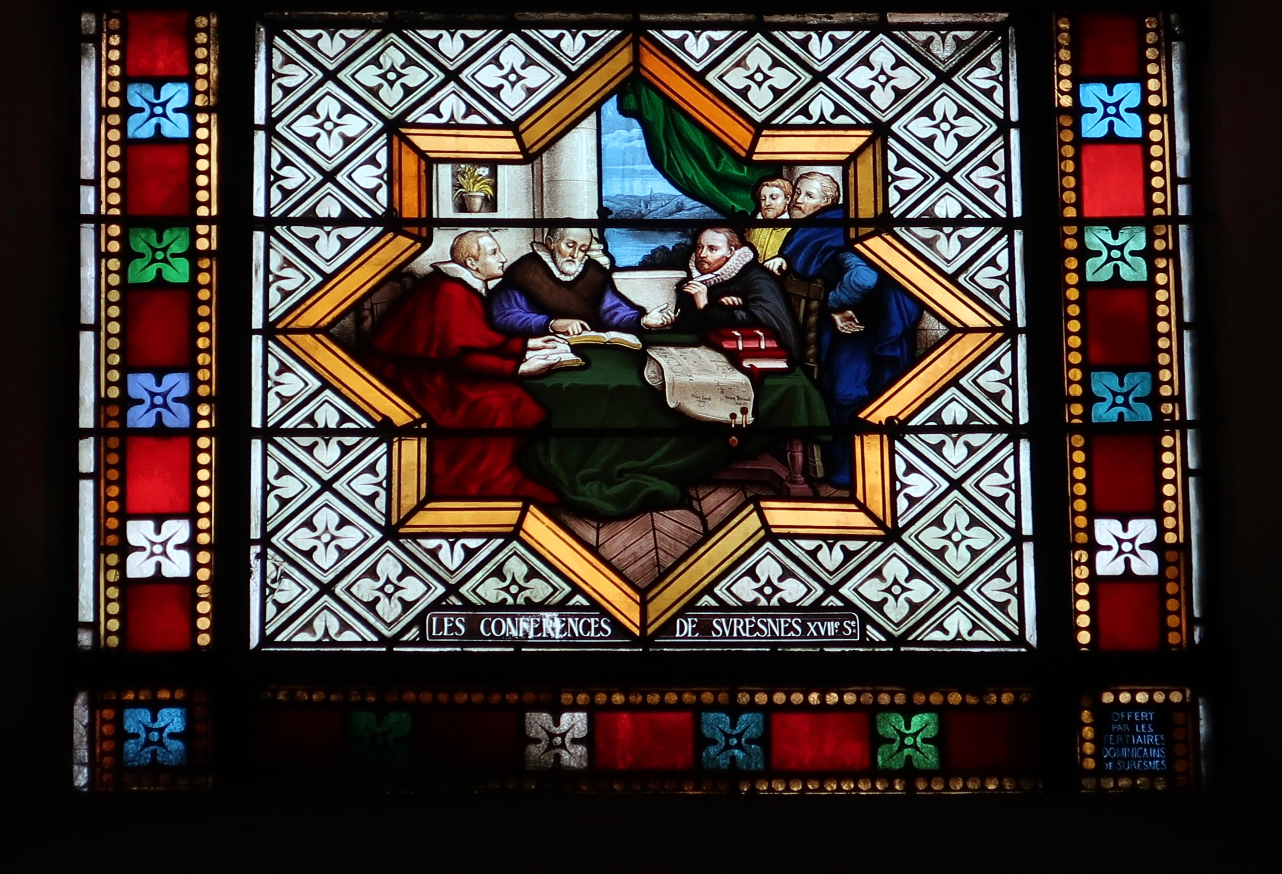 Détail d'un vitrail de l'église Cœur-Immaculé-de-Marie de Suresnes (Hauts-de-Seine) : « Les conférences de Suresnes ».